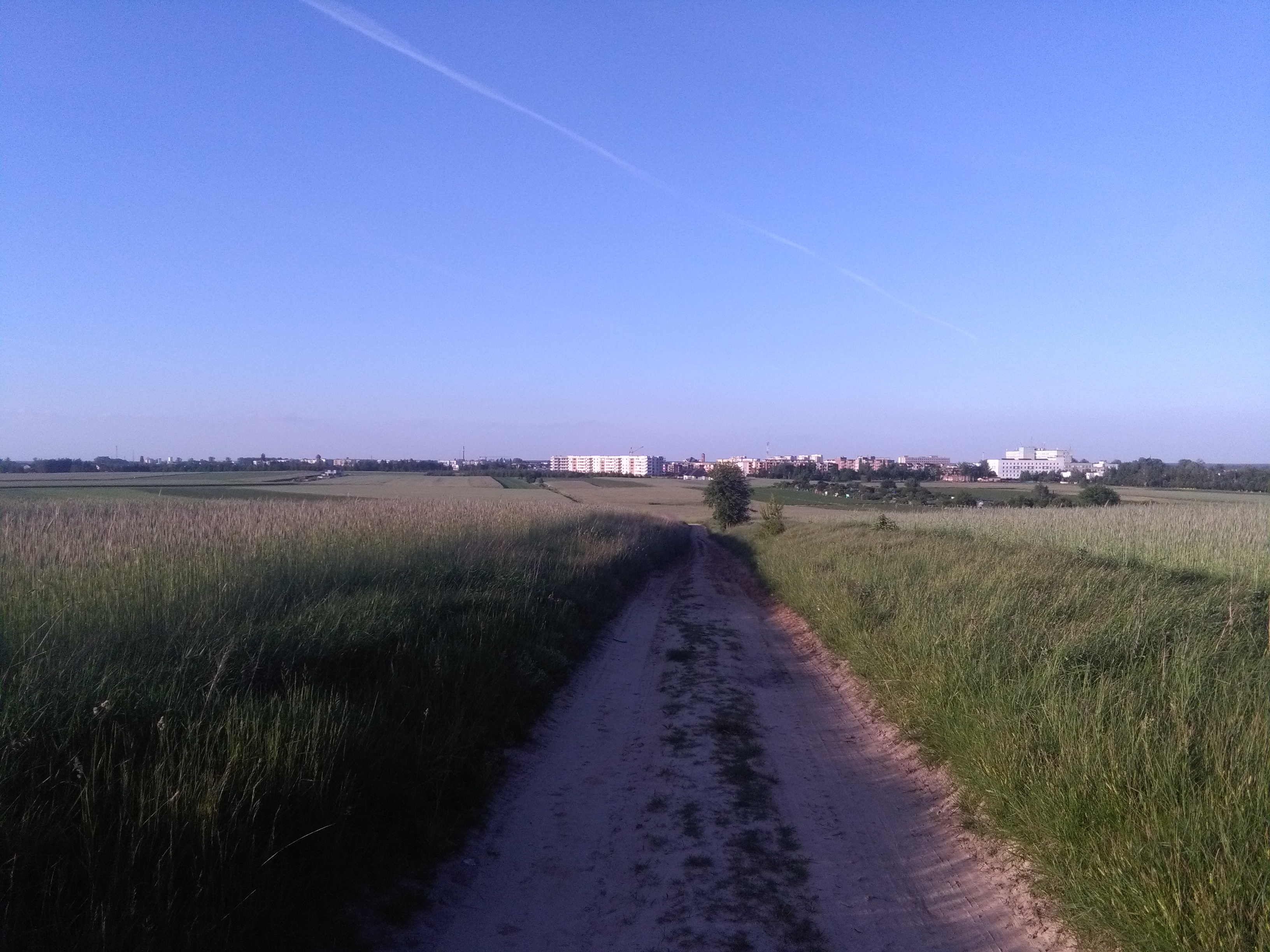 Panorama miasta Sieradz